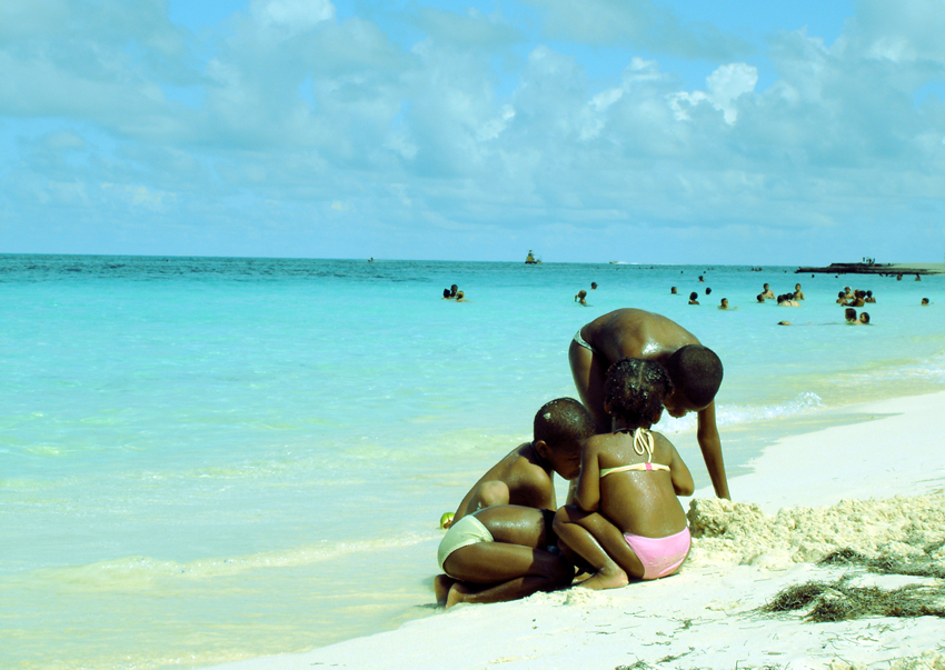 playa de San Andres, Colombia